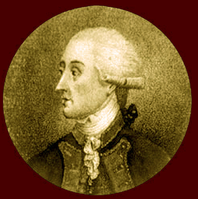 Jacques Bernard d'Anselme, compagnon de Rochambeau et Lafayette, aux USA, général de la Révolution, conquérant du comté de Nice